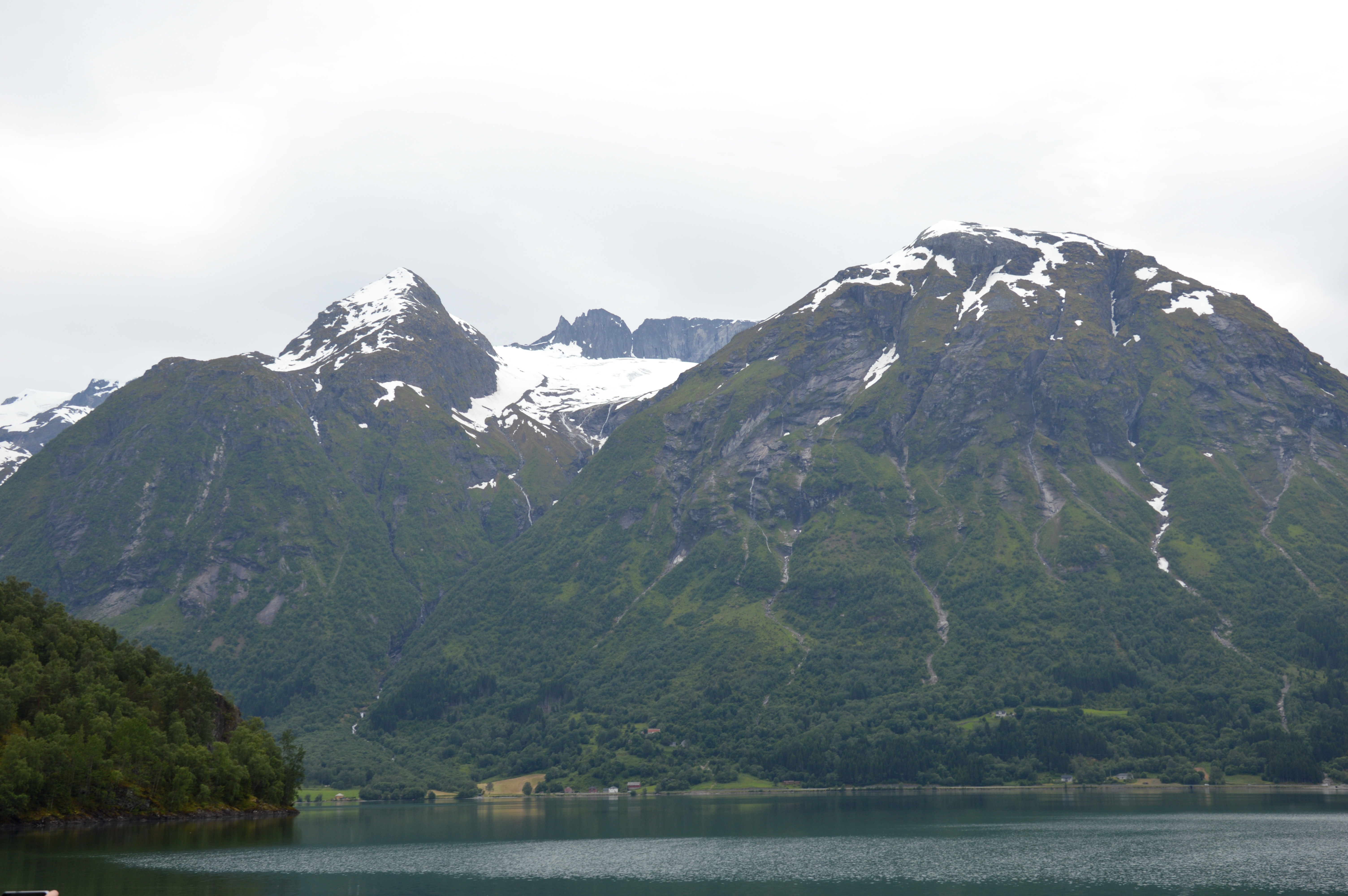 Blick auf Tindefjellbreen von Hellje